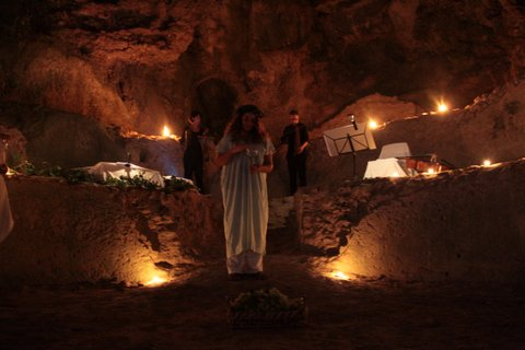 Grotta di Matermania - Spettacolo